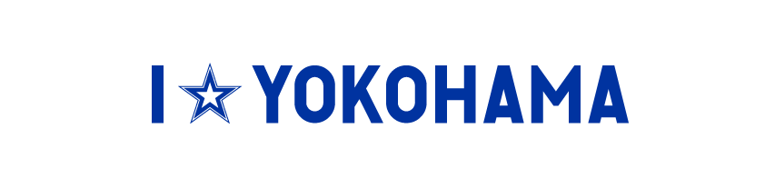 I_love_YOKOHAMA3.png